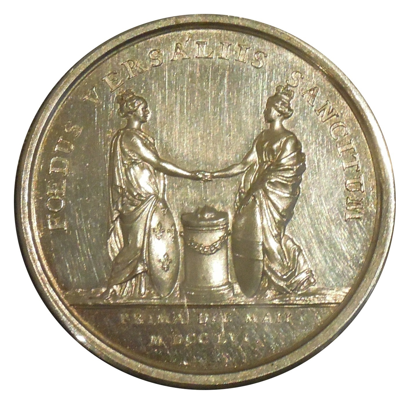 Französische Medaille auf den 1. Vertrag von Versailles Vorderseite: Allegorien Rückseite: Porträtbüste Ludwigs XV. Material: Silber